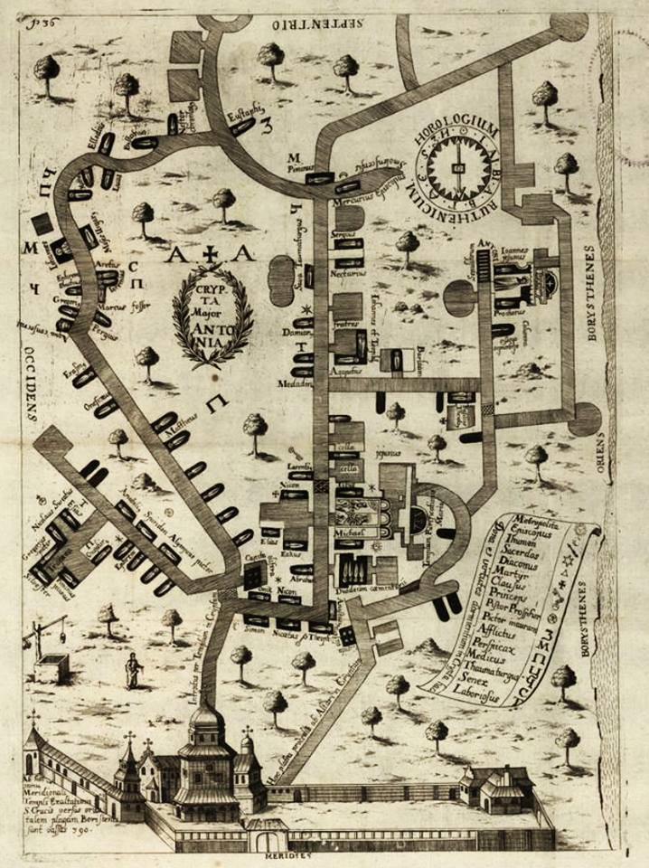 План печер Києво-Печерського монастиря.